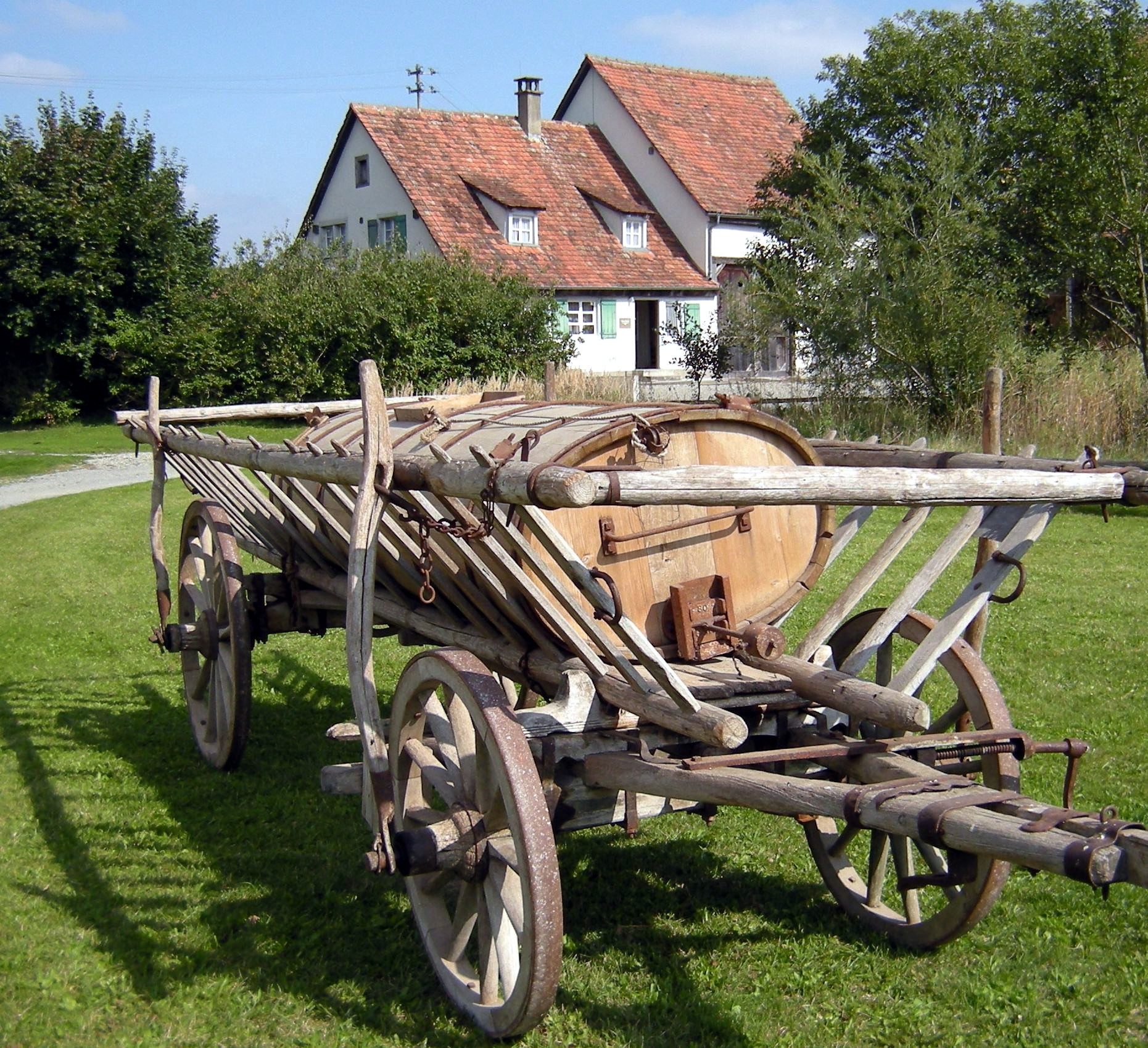 Bad Schussenried - Museumsdorf Kürnbach, Holz-Jauchefaß auf Leiterwagen